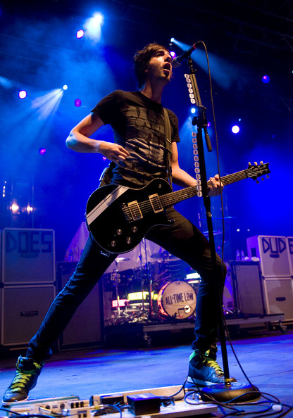 JBL...